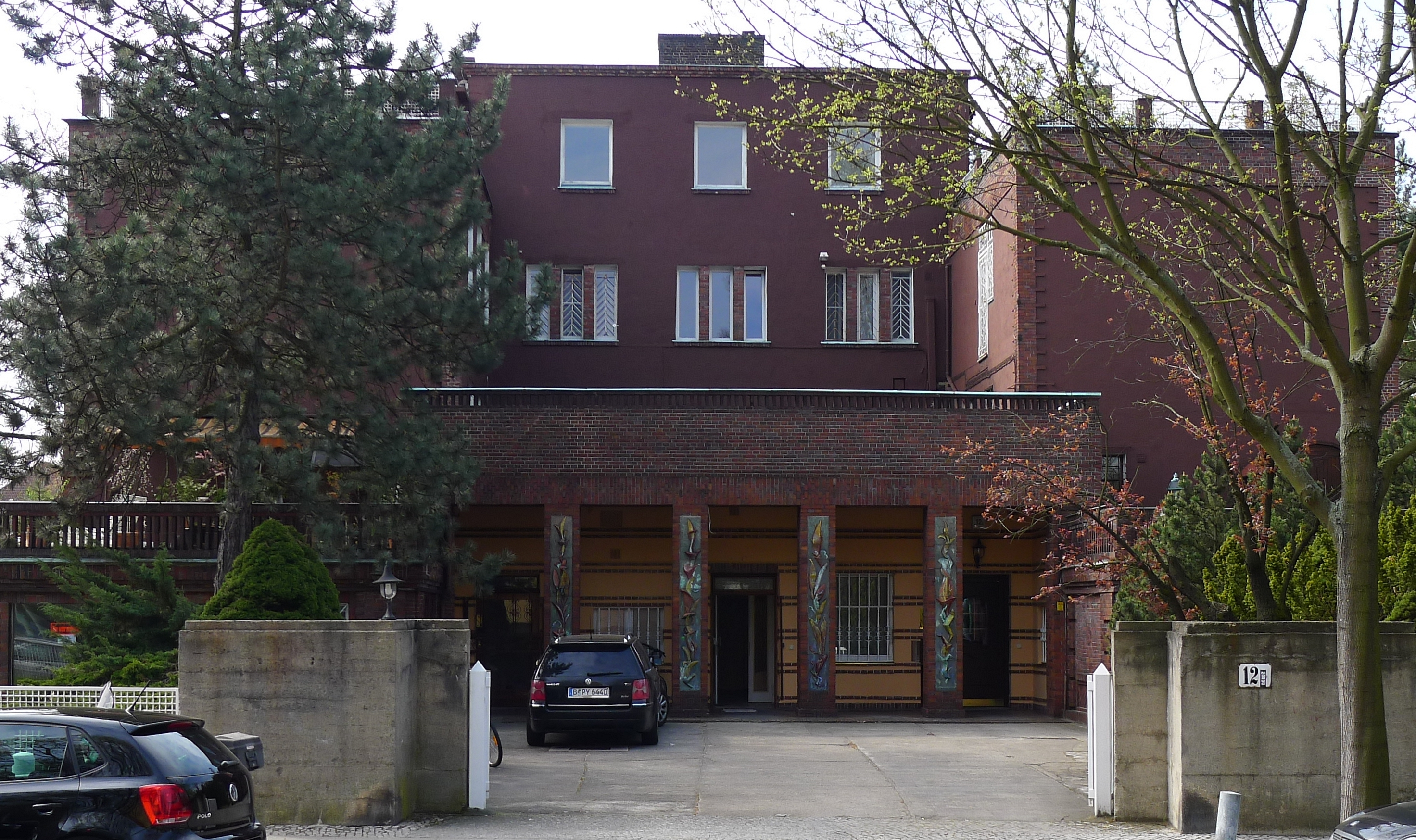 Wohnhaus